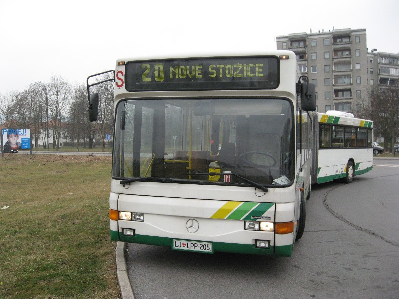 Avtobus Mercedes-Benz O405GN (nadgradnja opravljena v Avtomontaži) v lasti Ljubljanskega potniškega prometa. Avtor: Uporabnik:Minimoto